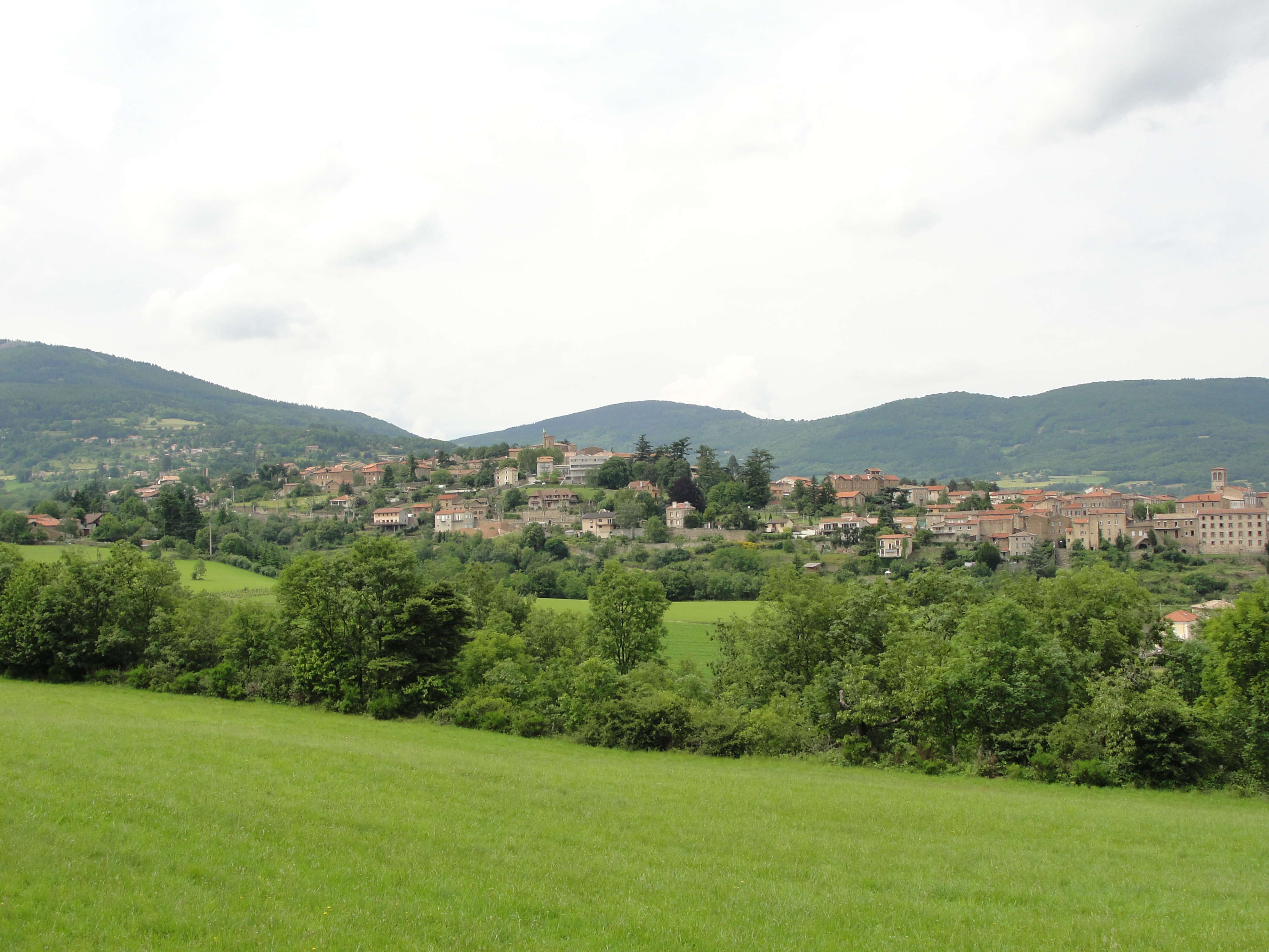 Localité de Pélussin (Loire).